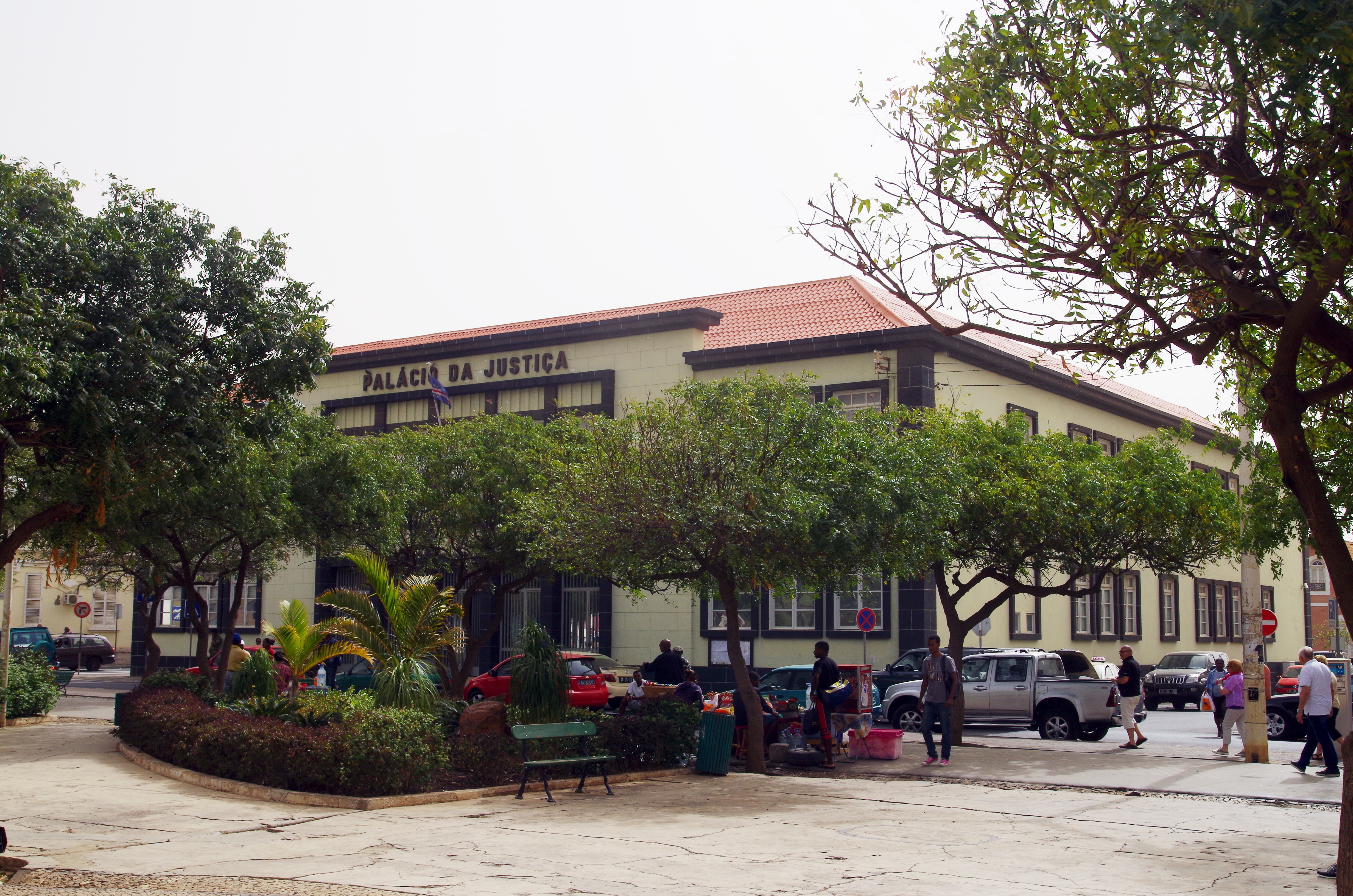 Justizpalast Praia